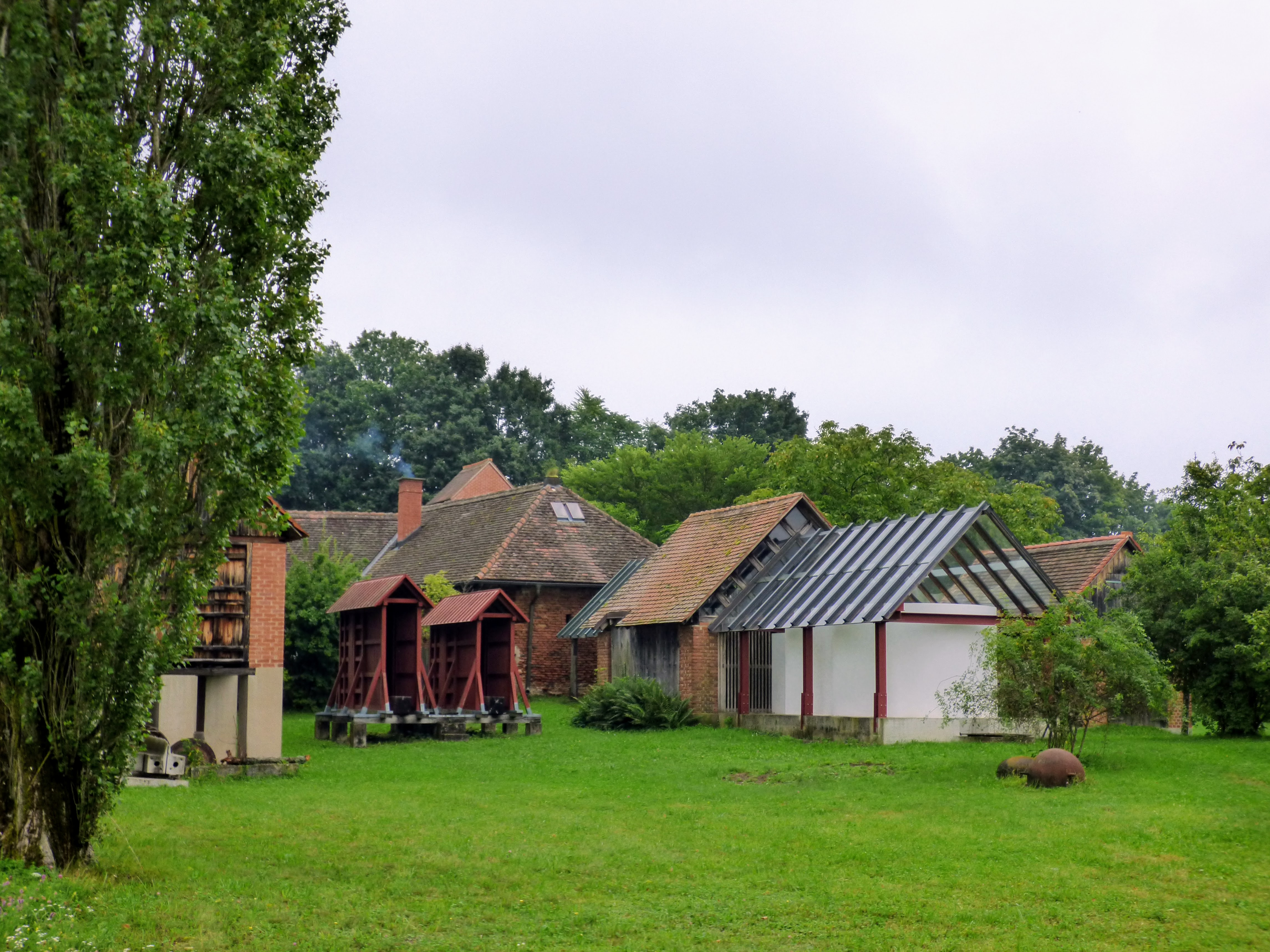 Anwesen Walter Pichler (1936-2012, Architekt, Bildhauer, Objektkünstler) Gemeinde St. Martin an der Raab, Burgenland